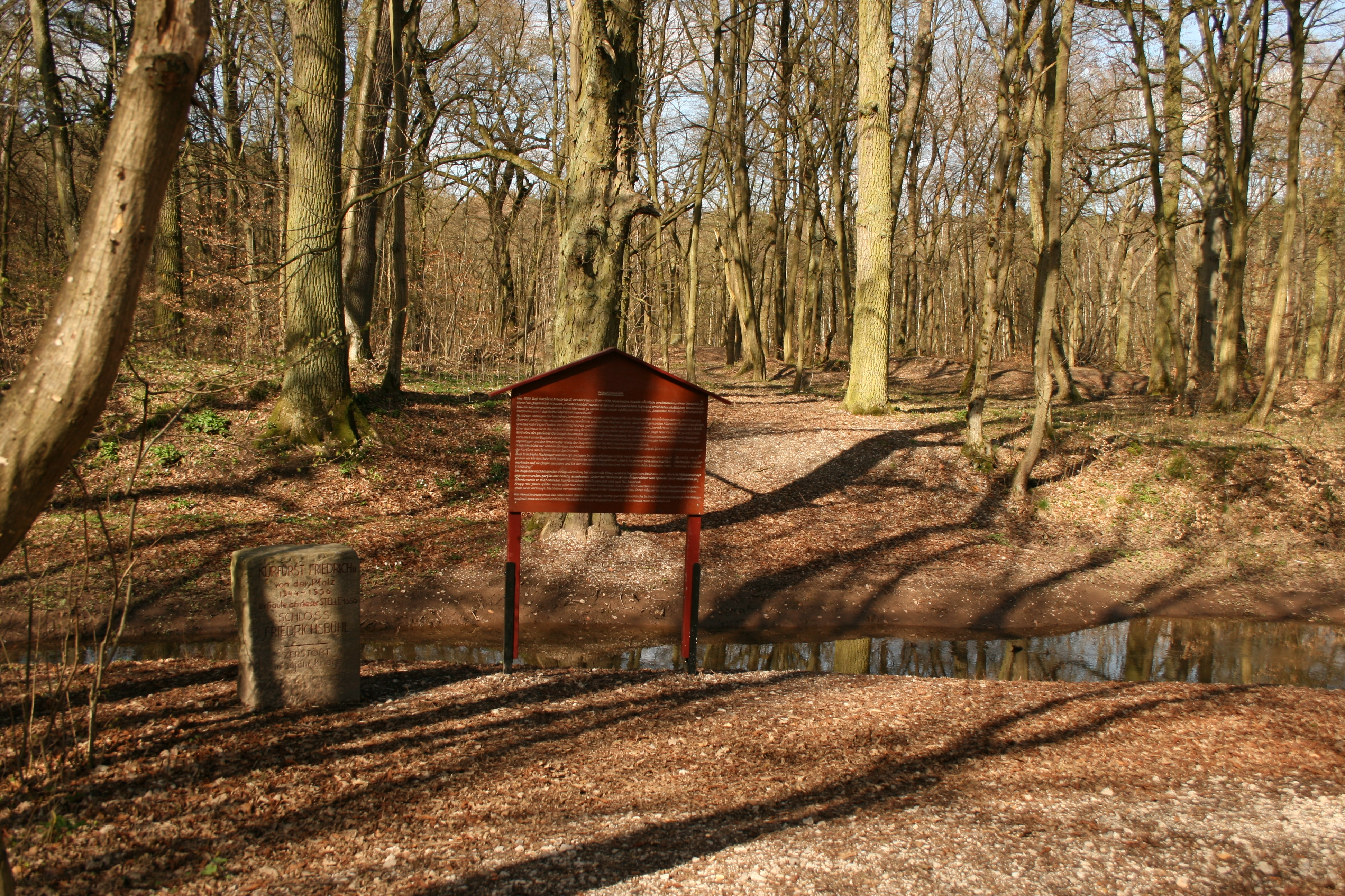 Schlossruine des Jagdschloss Friedrichsbühl bei Bellheim